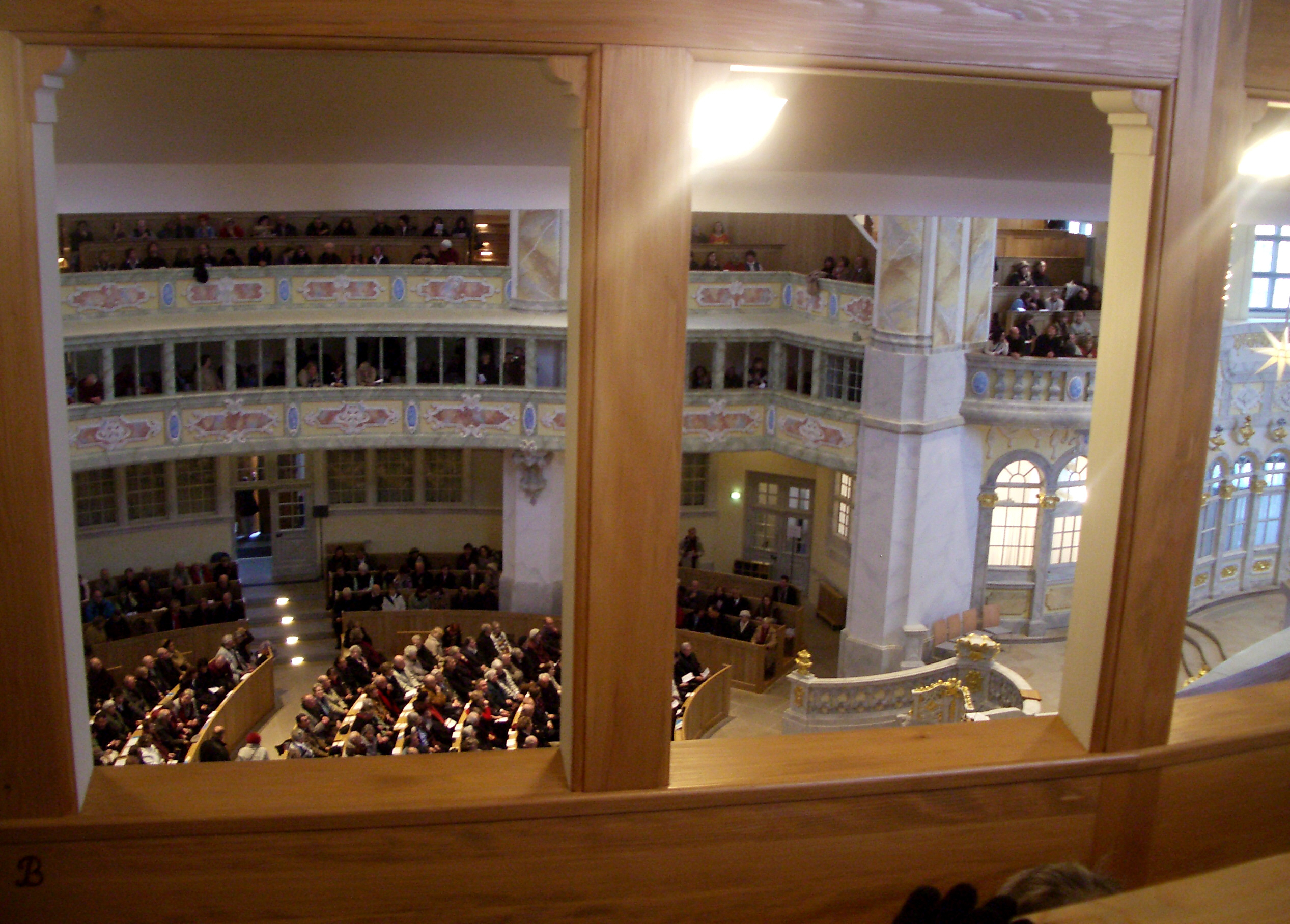 Gottesdienst in der Dresdener Frauenkirche